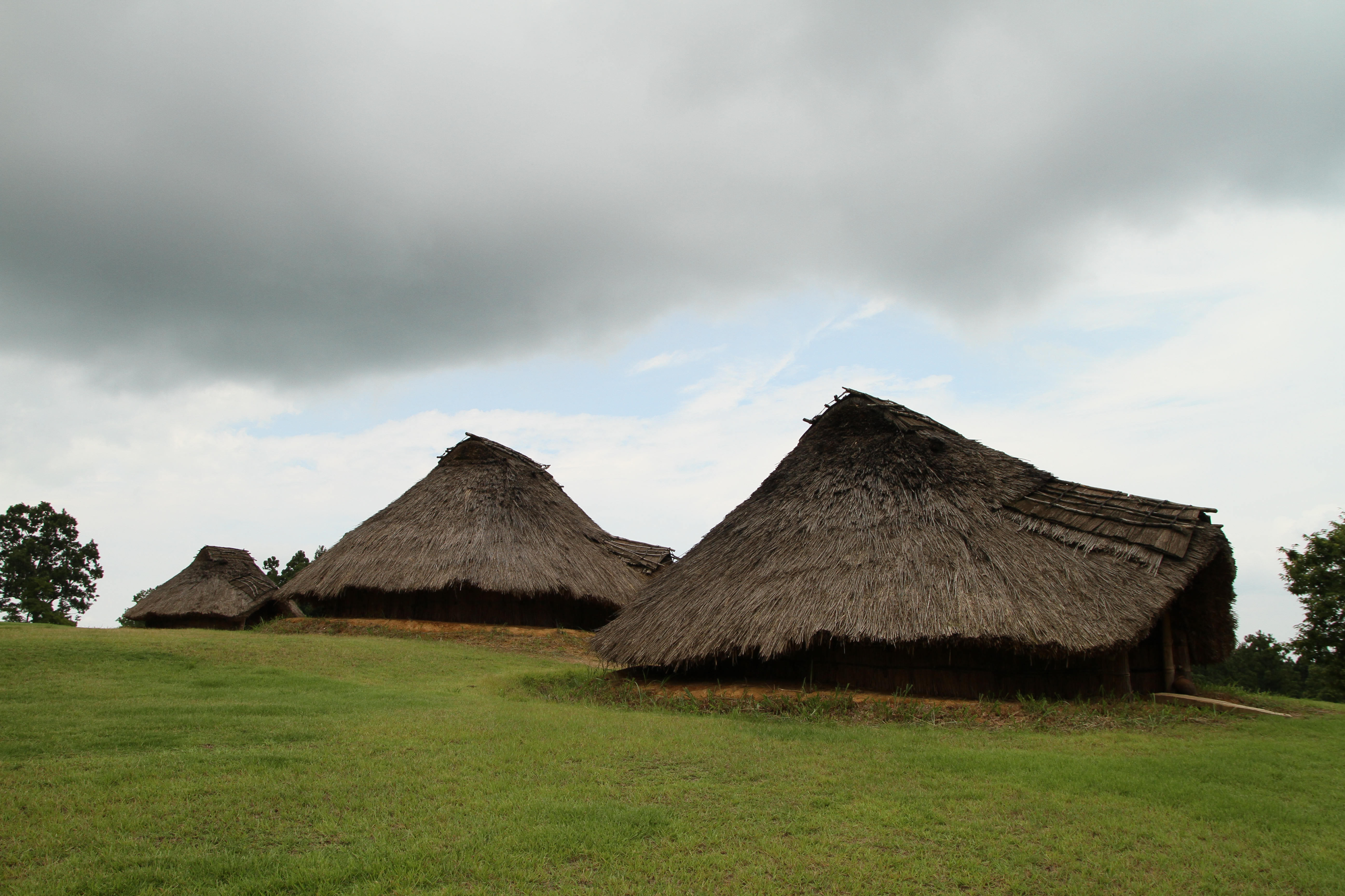 古津八幡山遺跡の復元竪穴式住居